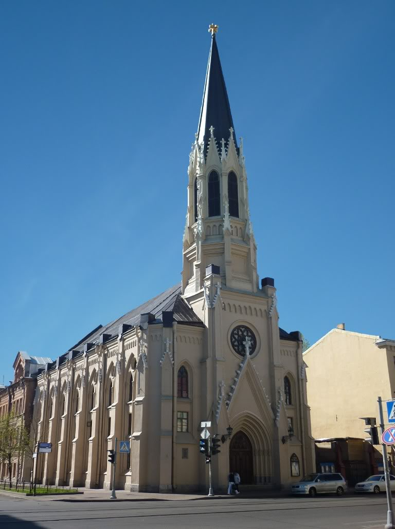 евангелическо-лютеранская церковь Святого Михаила